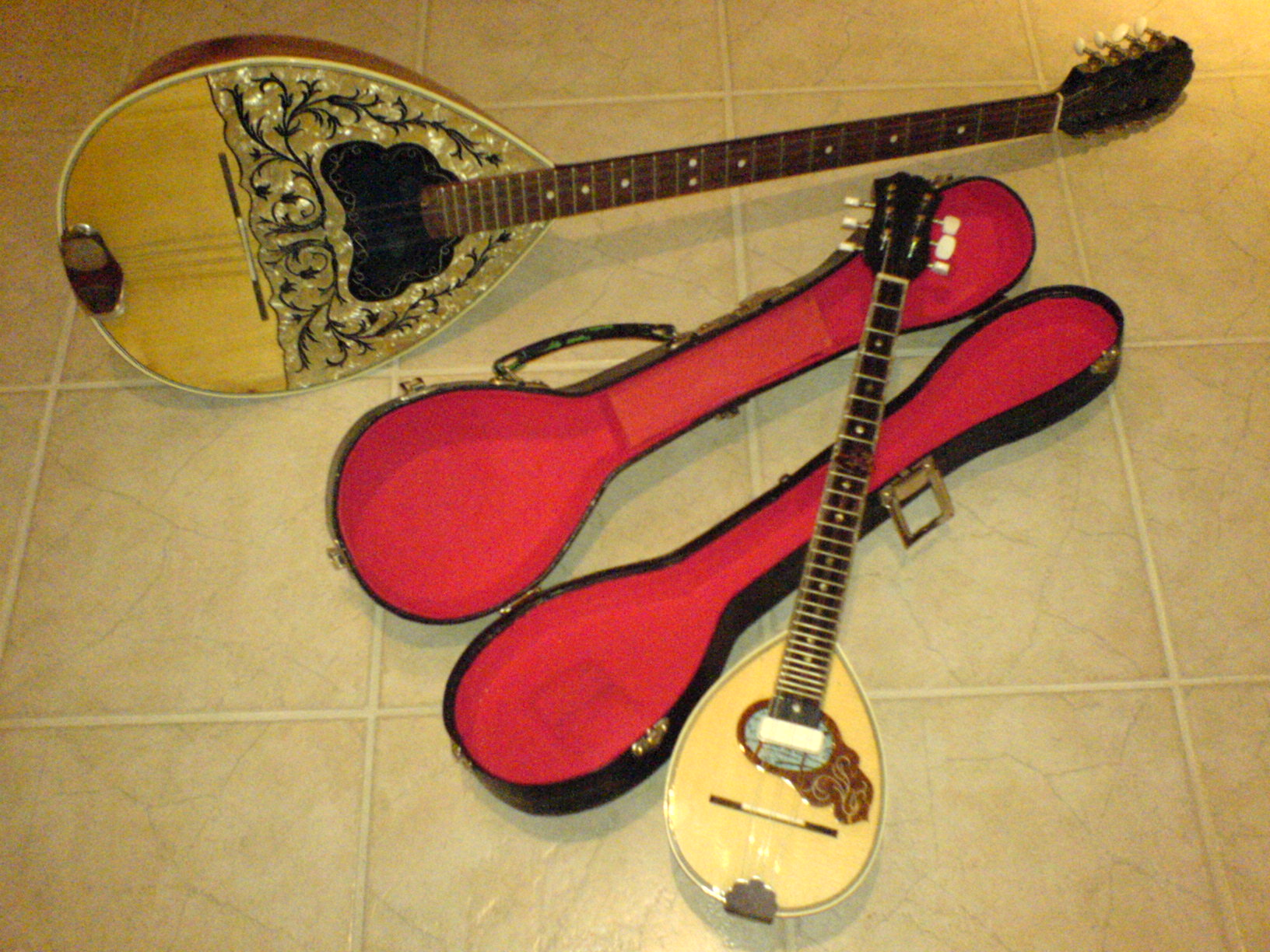 Baglamas